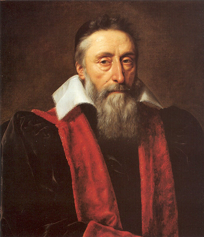 Guillaume du Vair (1556-1621), französischer Essayist und Staatsmann. Rau's collection